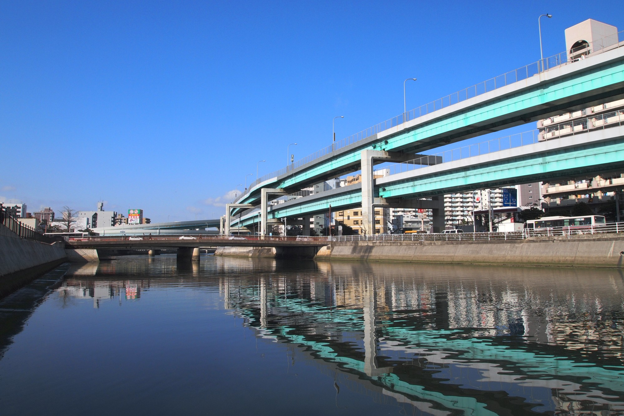 福岡県を流れる河川「御笠川」。博多区御共所町にて。